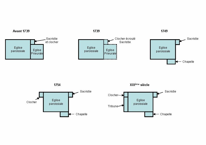 Schémas montrant l'évolution de la structure de l'église de Cannes-Ecluse (Seine et Marne)